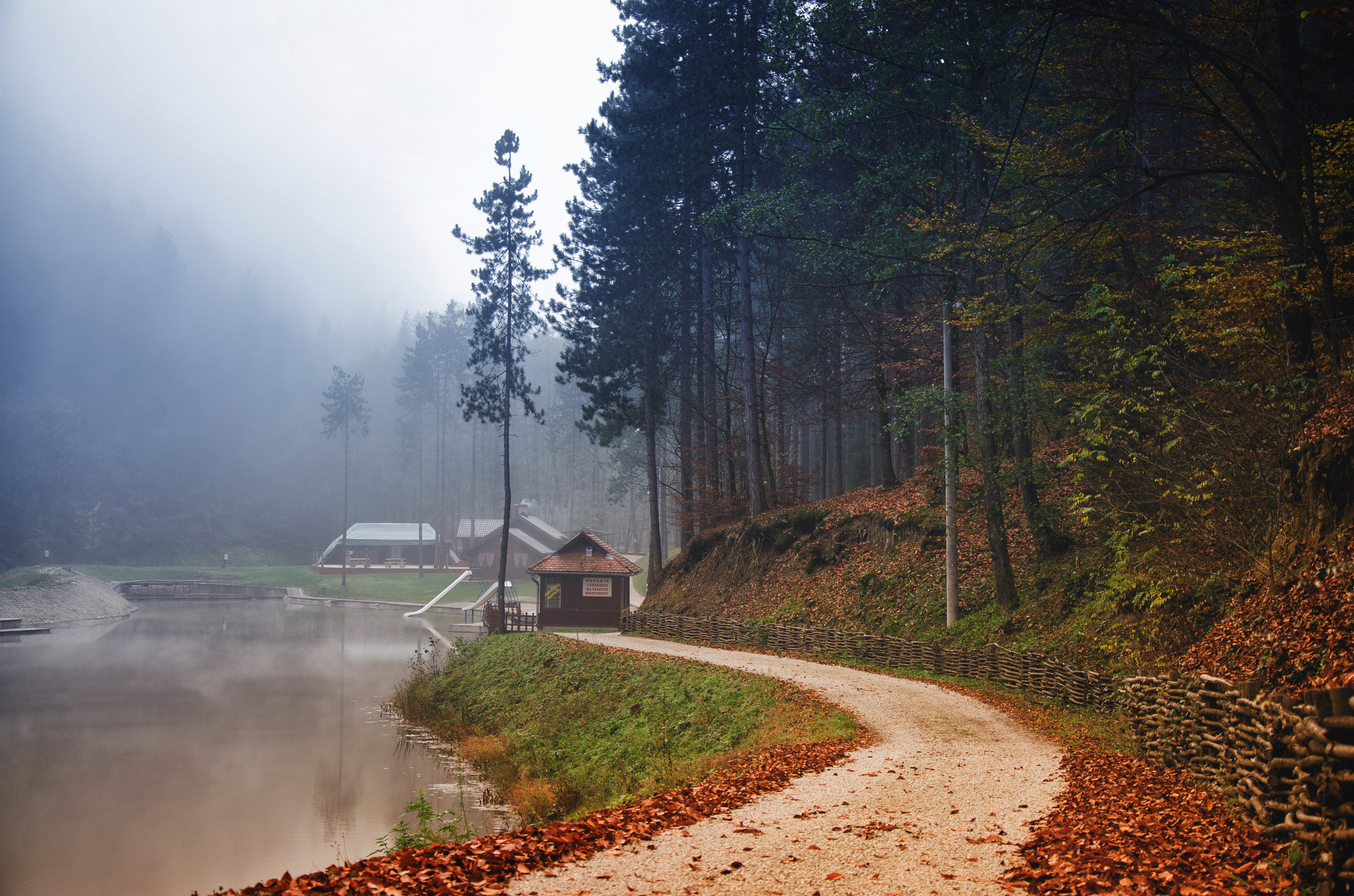 Горанско језеро је вјештачко језеро у граду Добој